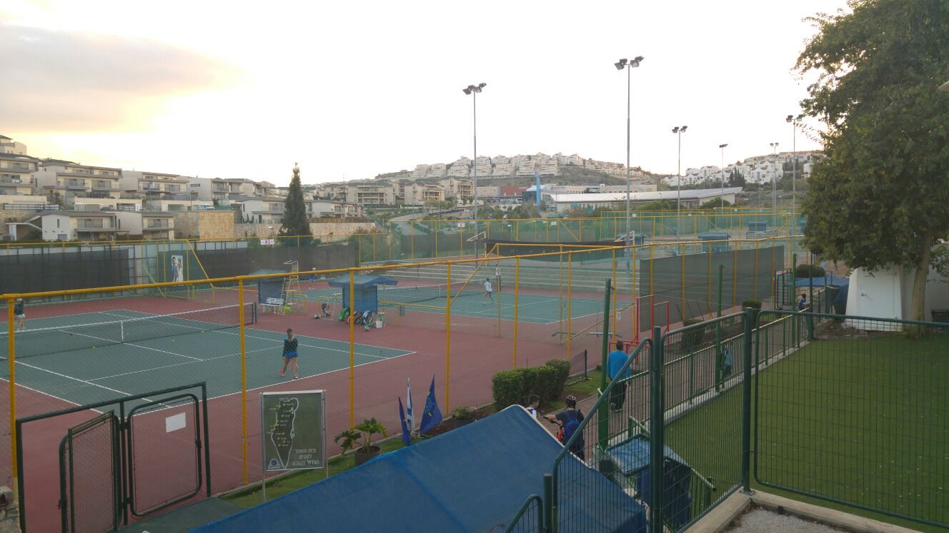 המרכז לטניס בישראל - יקנעם